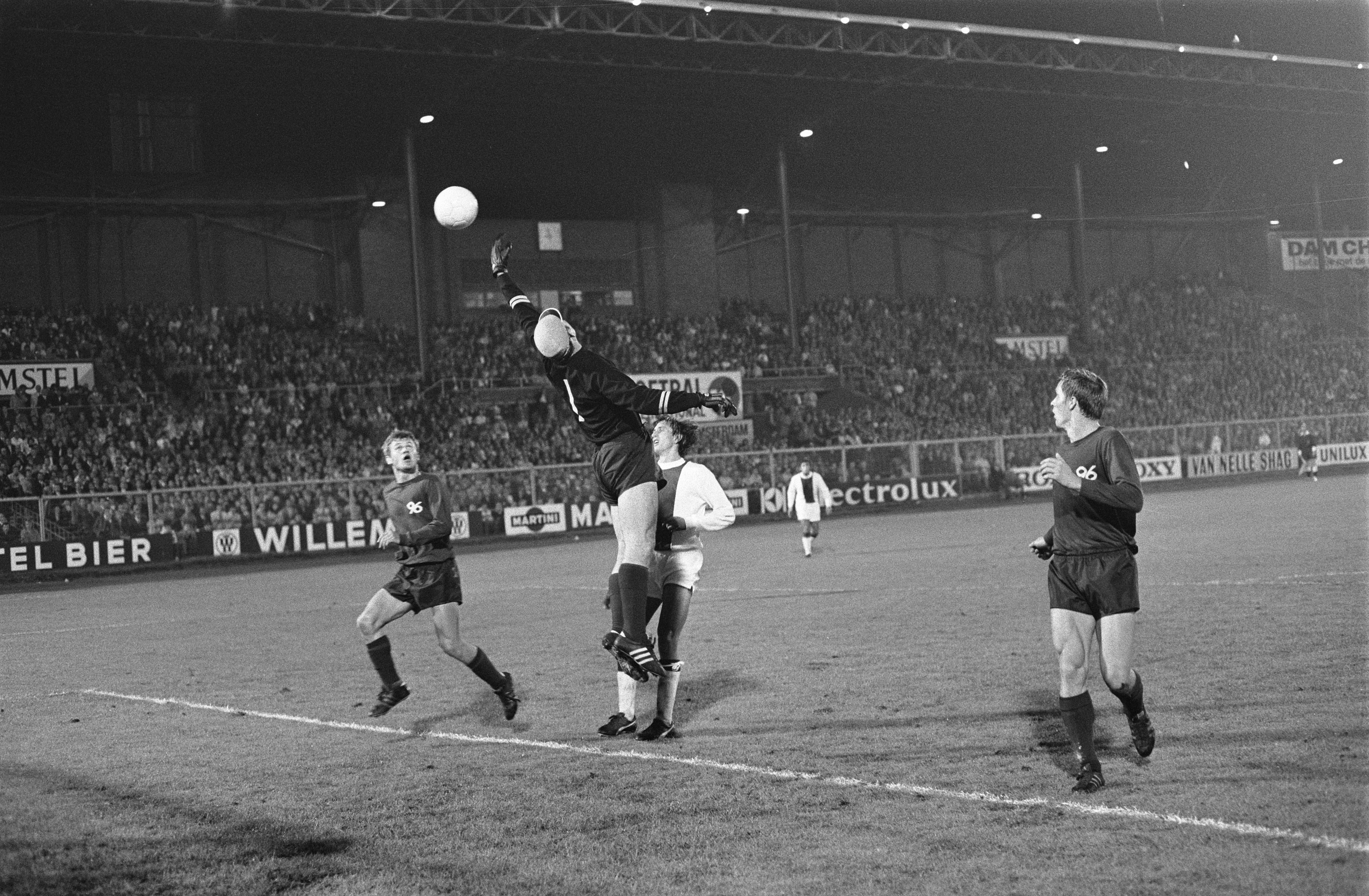 Collectie / Archief : Fotocollectie Anefo Reportage / Serie : [ onbekend ] Beschrijving : Ajax tegen Hannover 96 in het Olympisch Stadion Amsterdam in de Europa Cup voor Jaarbeurssteden (3-0). Keeper Horst Podlasly van Hannover reikt naar de bal voordat Johan Cruijff een kans krijgt Annotatie : Links (omhoog kijdend) Rainer Stiller Datum : 24 september 1969 Locatie : Amsterdam, Noord-Holland Trefwoorden : sport, voetbal Persoonsnaam : Cruijff, Johan Instellingsnaam : Europa Cup Fotograaf : Koch, Eric / Anefo Auteursrechthebbende : Nationaal Archief Materiaalsoort : Negatief (zwart/wit) Nummer archiefinventaris : bekijk toegang 2.24.01.05 Bestanddeelnummer : 922-8210